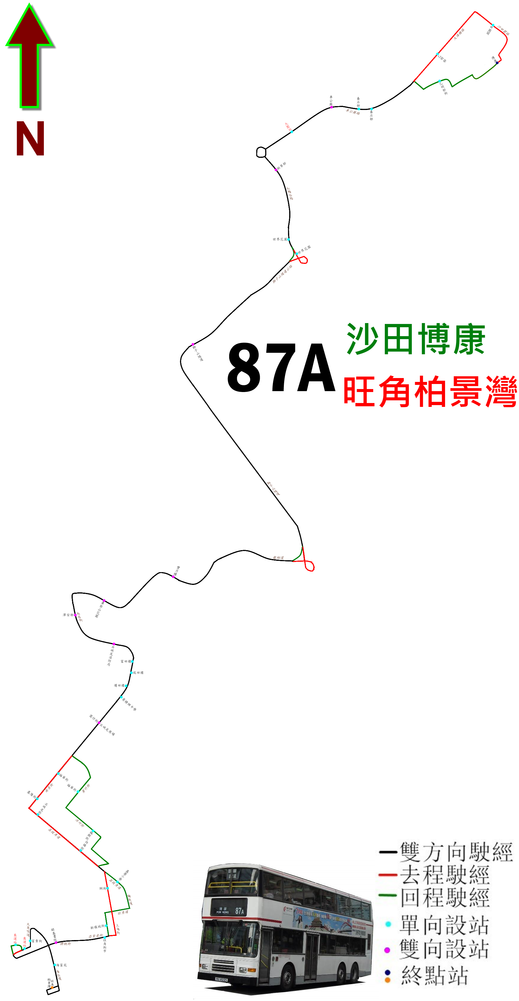 中文（香港）: 九巴87A線的走線圖